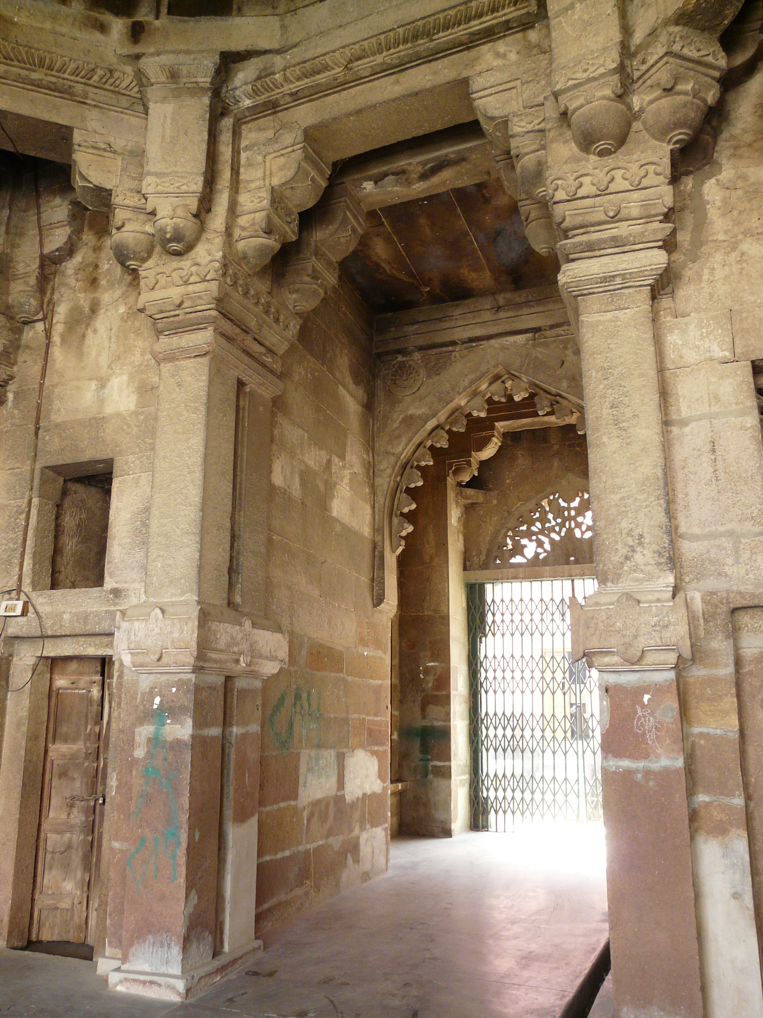 Entrance interior, Atala Masjid, Jaunpur.